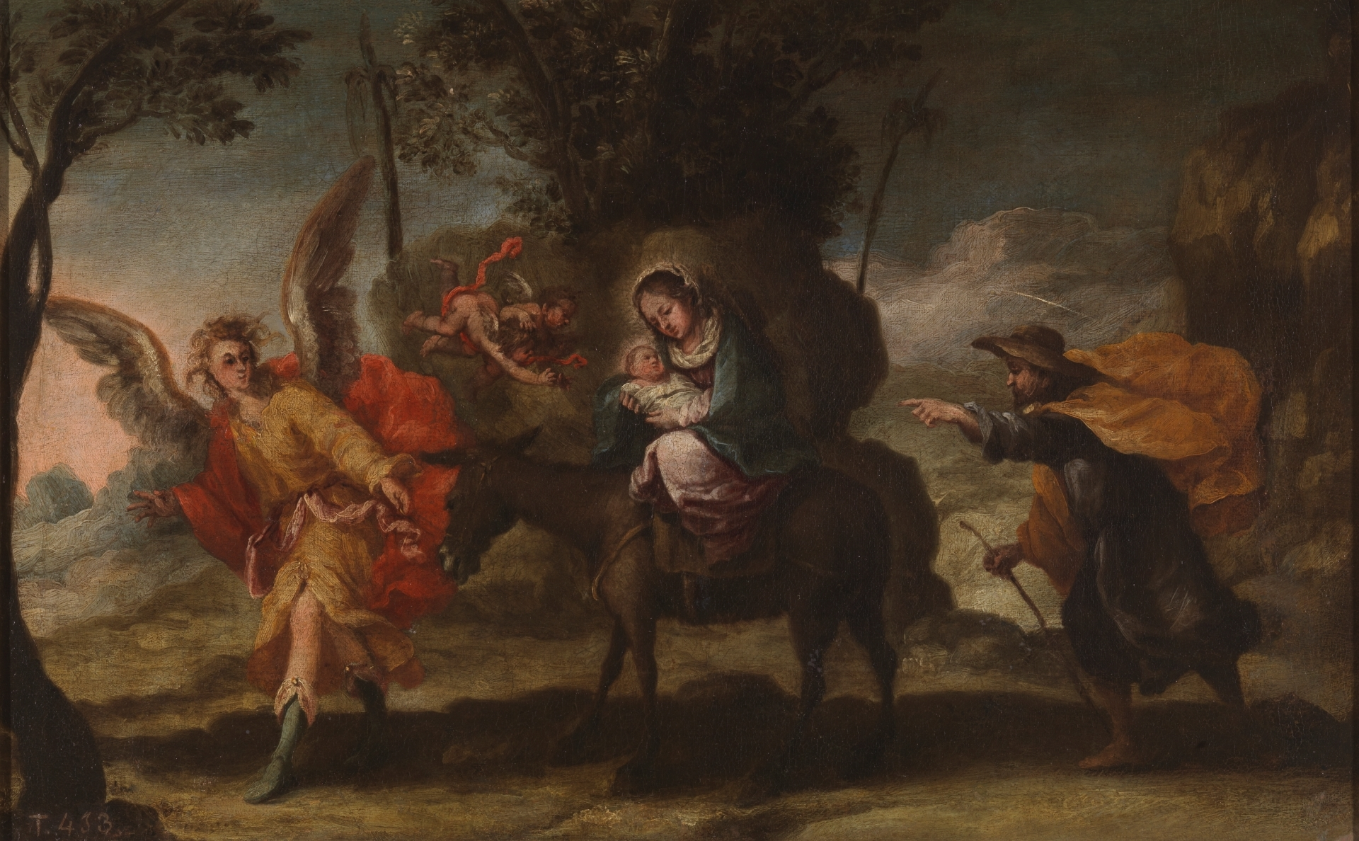 La obra representa a los tres miembros de la Sagrada Familia cristiana huyendo hacia Egipto a fin de impedir que el rey Herodes el Grande diera muerte al Niño Jesús. Este lienzo y sus compañeros proceden del convento de San Felipe el Real de Madrid e ingresaron en el Museo del Prado procedentes del Museo de la Trinidad. Atribuidos tradicionalmente a Francisco Antolínez, Angulo no los cree suyos, sino de un artista aún anónimo, cuyo estilo está entre Antolínez, Arteaga y Juan Alfaro.